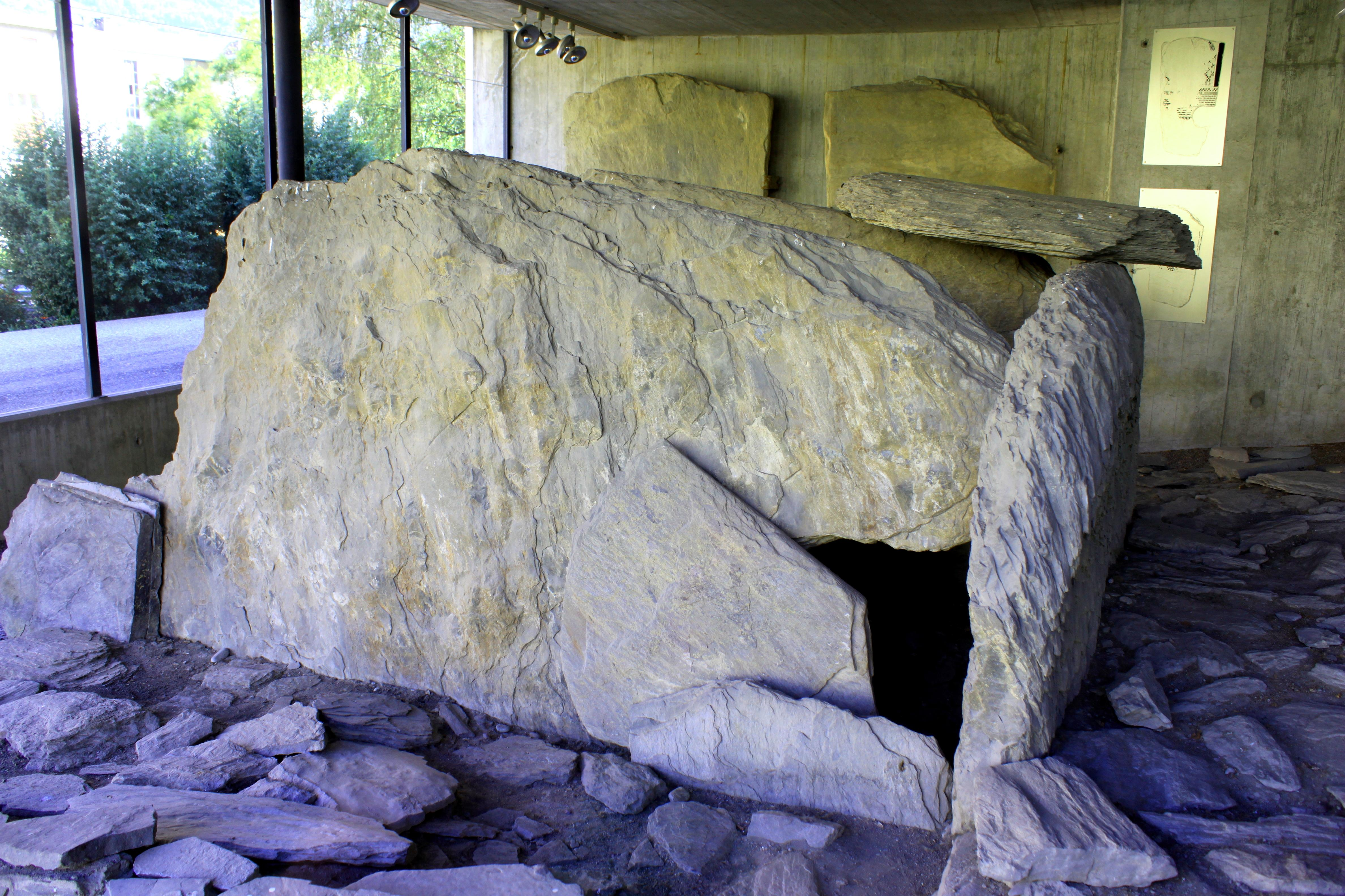 Suisse, canton du Valais, Sion, la ville : la nécropole du Petit-Chasseur et celle de Sous-le-Scex témoignent de l'occupation de la ville dès le néolithique. Dolmen du Néolithique récent.